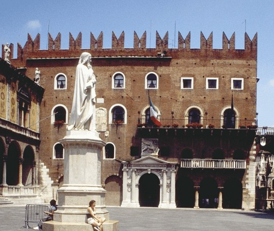 Verona, Palazzo Cangrande (Palazzo del Podestà)